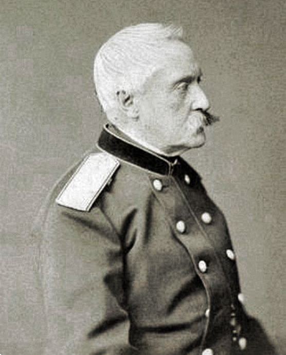 Gregor von Helmersen (1803-1885)